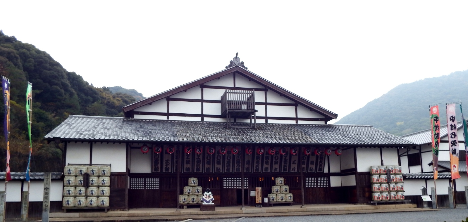 金丸座の正面